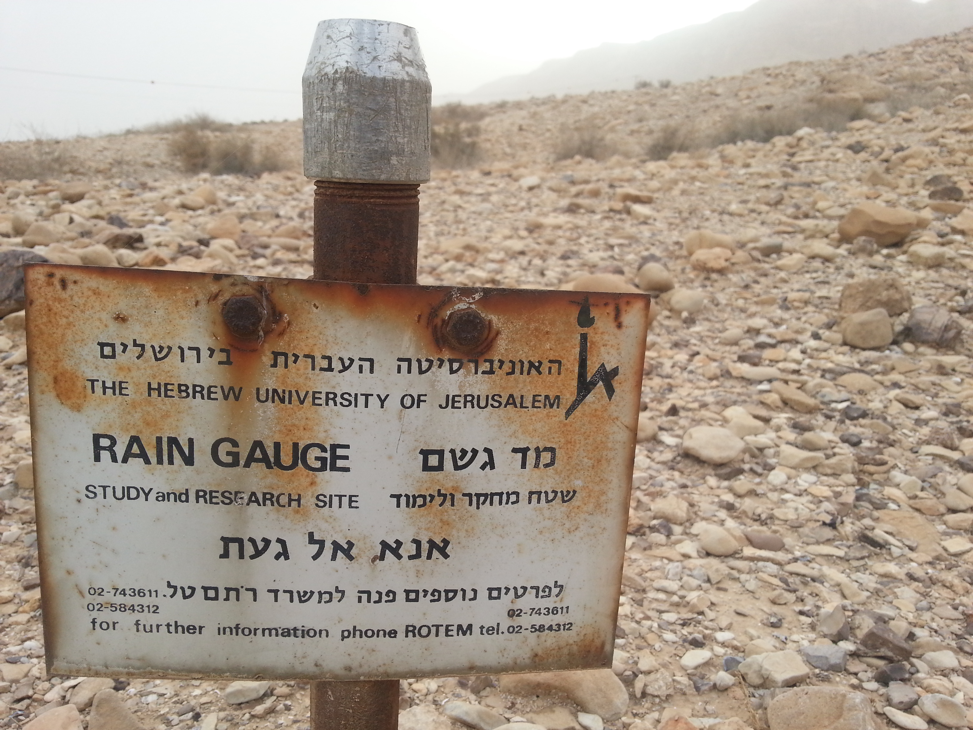 מד גשם שהוצב תחת מחקר באוניברסיטה העברית בשנות ה-80